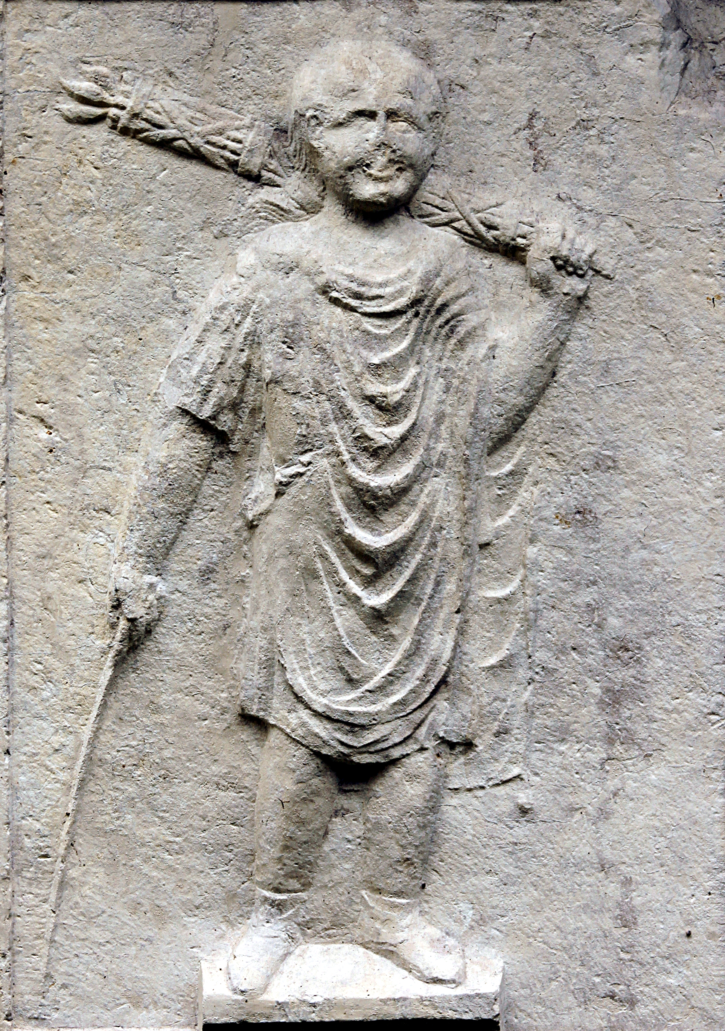 Museo archeologico a Verona - Verona